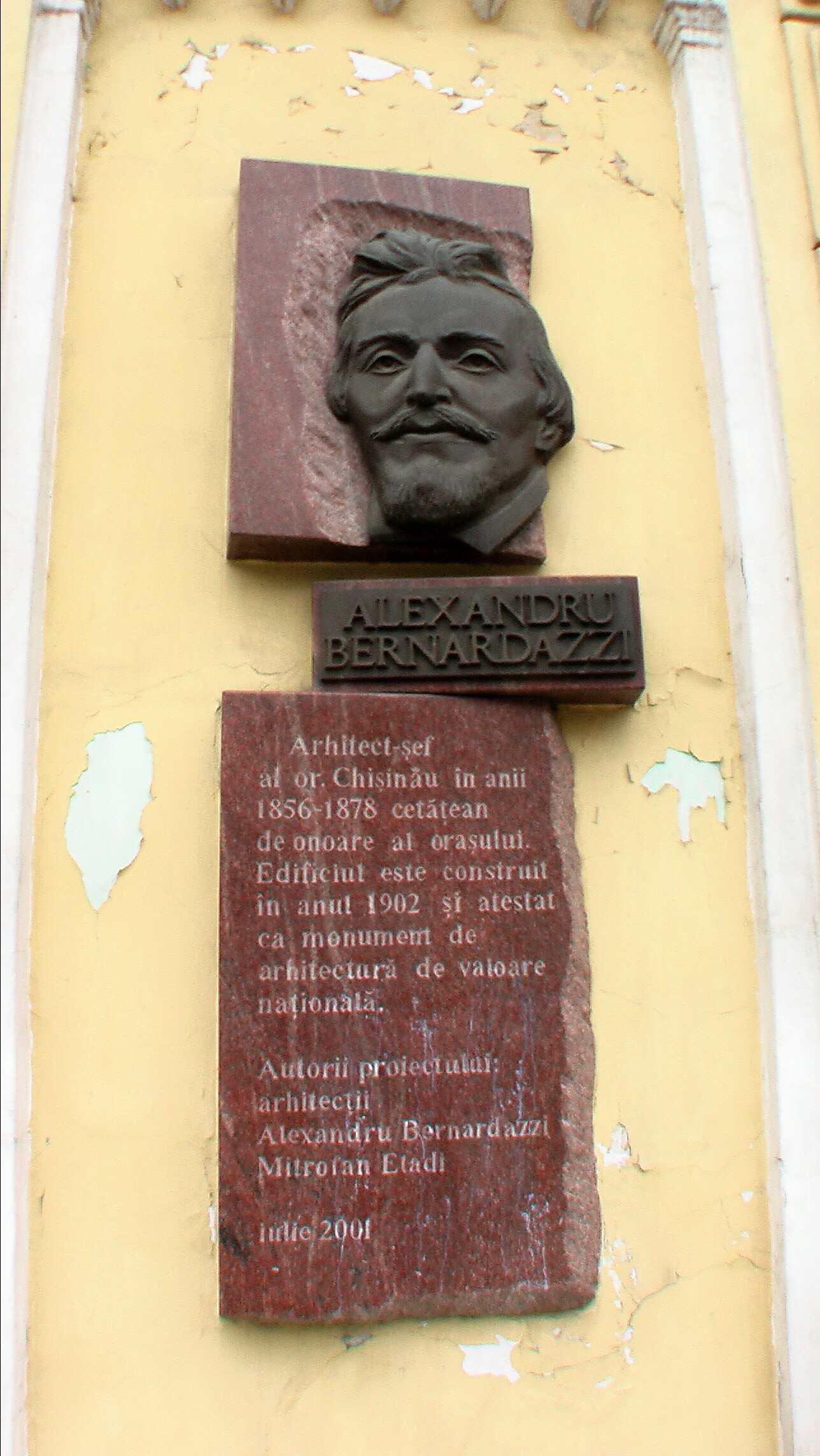 Alexander Bernardazzi Chisinau